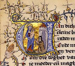 Verluchte initiaal aan het begin van de Beatrijs-legende. Auteur onbekend, ca. 1300, Brabant. Den Haag, Koninklijke Bibliotheek, 76 E 5 Waarschijnlijk afkomstig van [1]